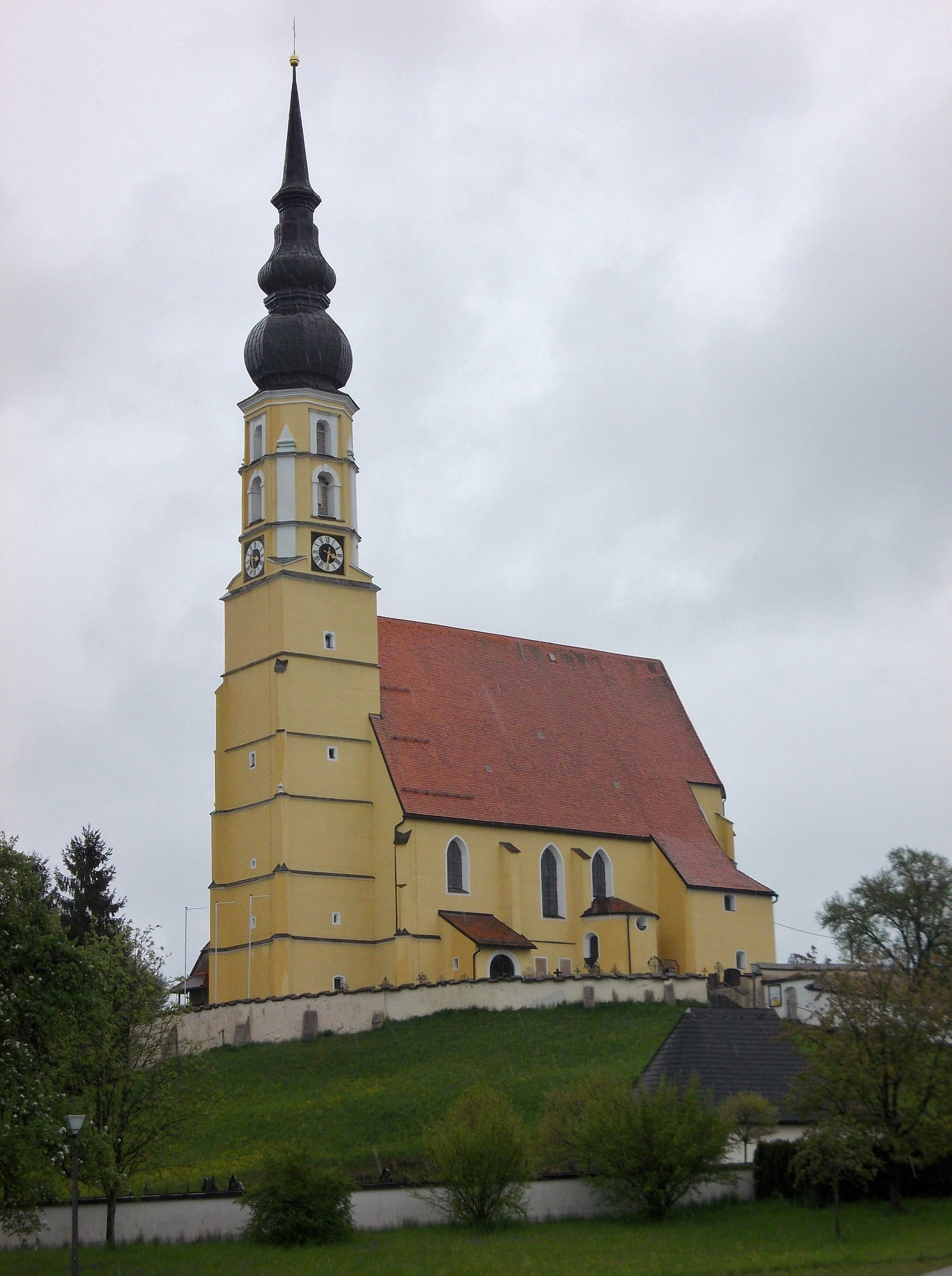 Kath. Pfarrkirche Mariä Himmelfahrt und Friedhof mit Torbau